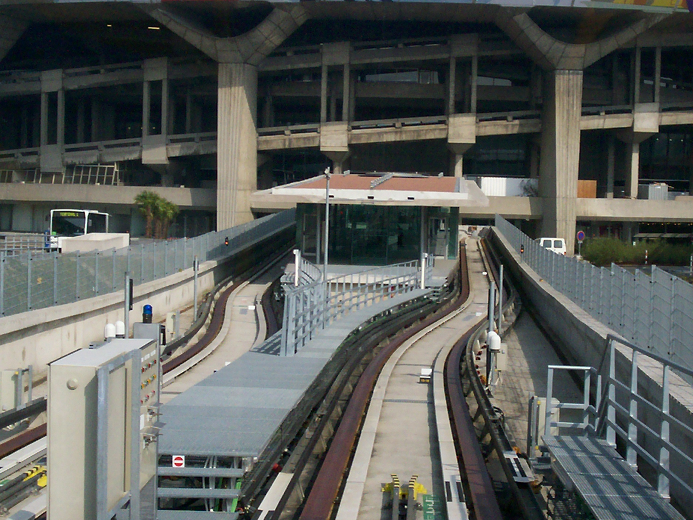 Vue de la station terminus "Terminal 1"